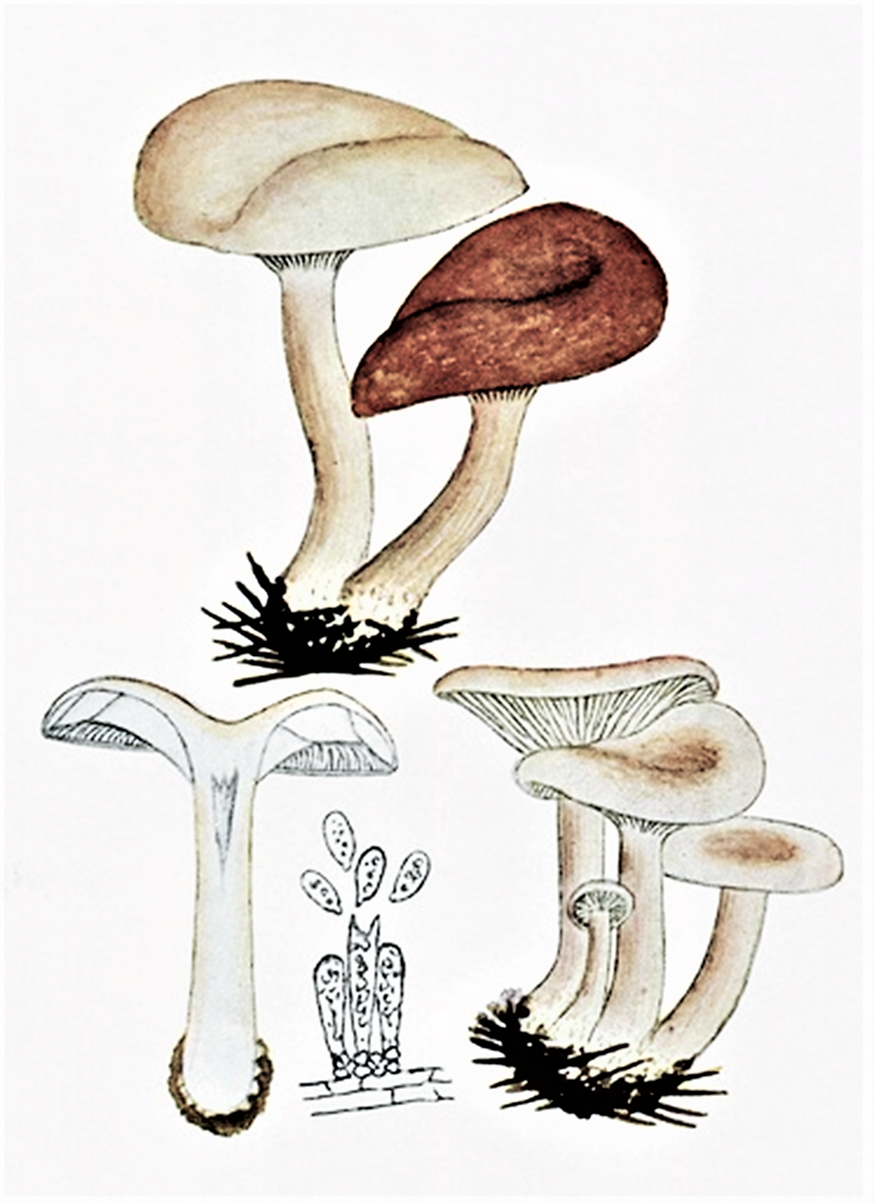 Giacomo Bresadola: Clitocybe rivulosa (Pers., 1801), P.Kumm. (1871)